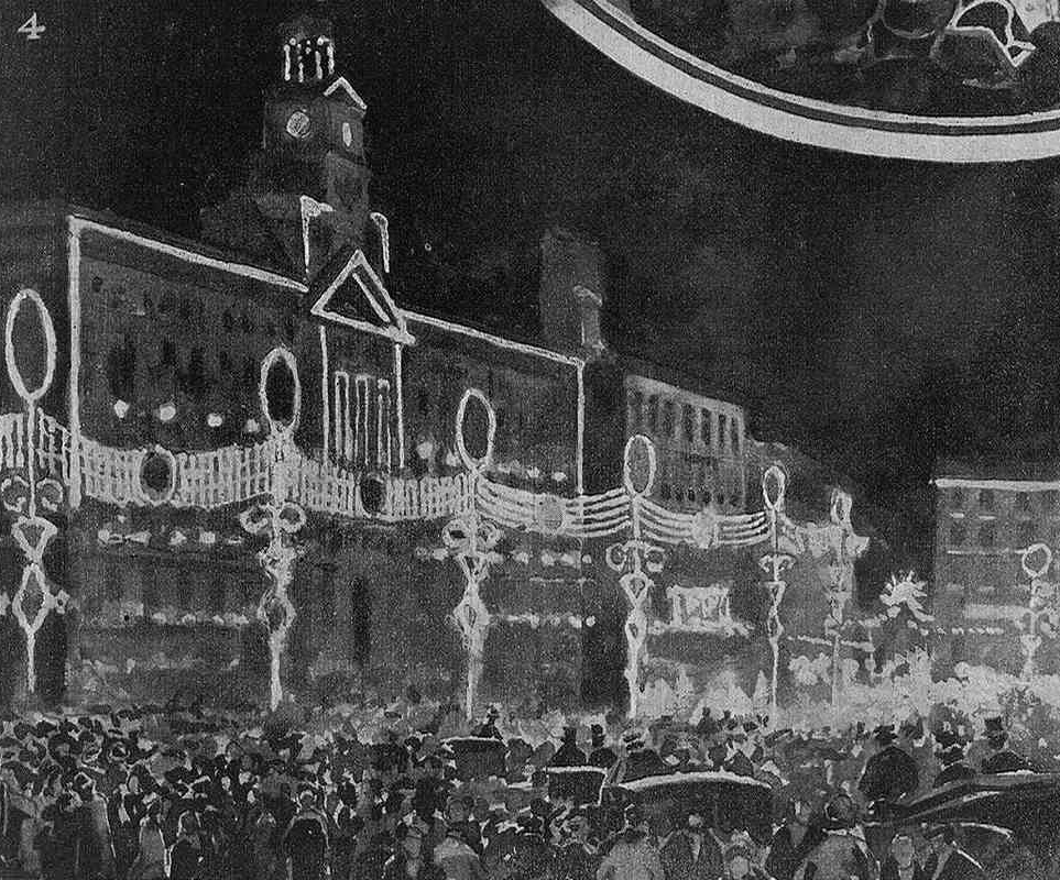 Viaje de M. Loubet á Madrid.—1. Revista militar.—2. La corrida regia.—3. Decoración exterior del Ayuntamiento.—4. La Puerta del Sol iluminada. Dibujos del natural y composición de Salvador Azpiazu.